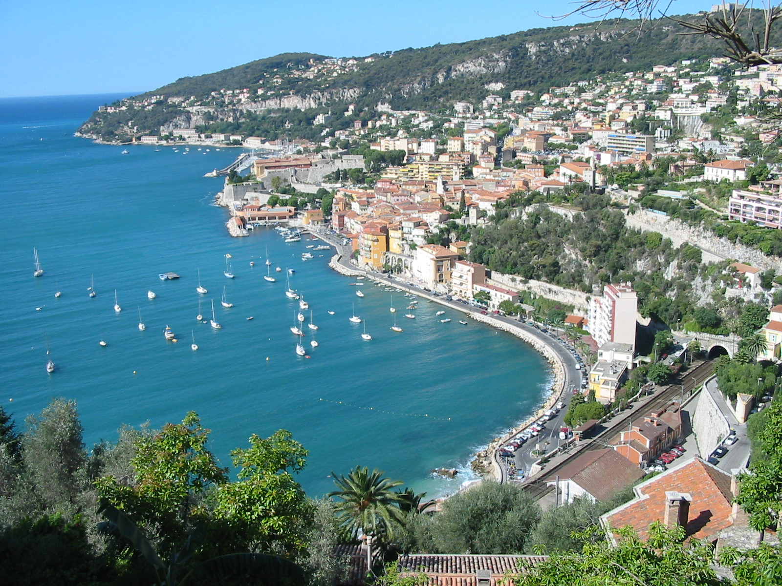 Villefranche-sur-Mer, Alpes-Maritimes, France